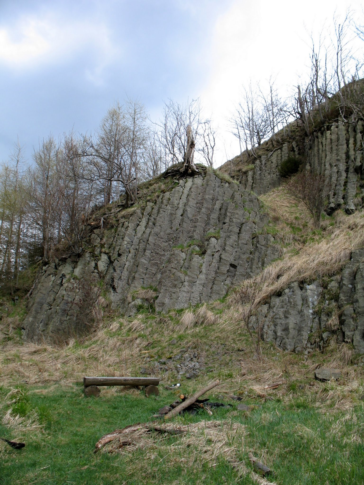 Lom v západním úbočí vrchu Velký Špičák (Krušné hory) se sloupcovitou odlučností nefelinitu